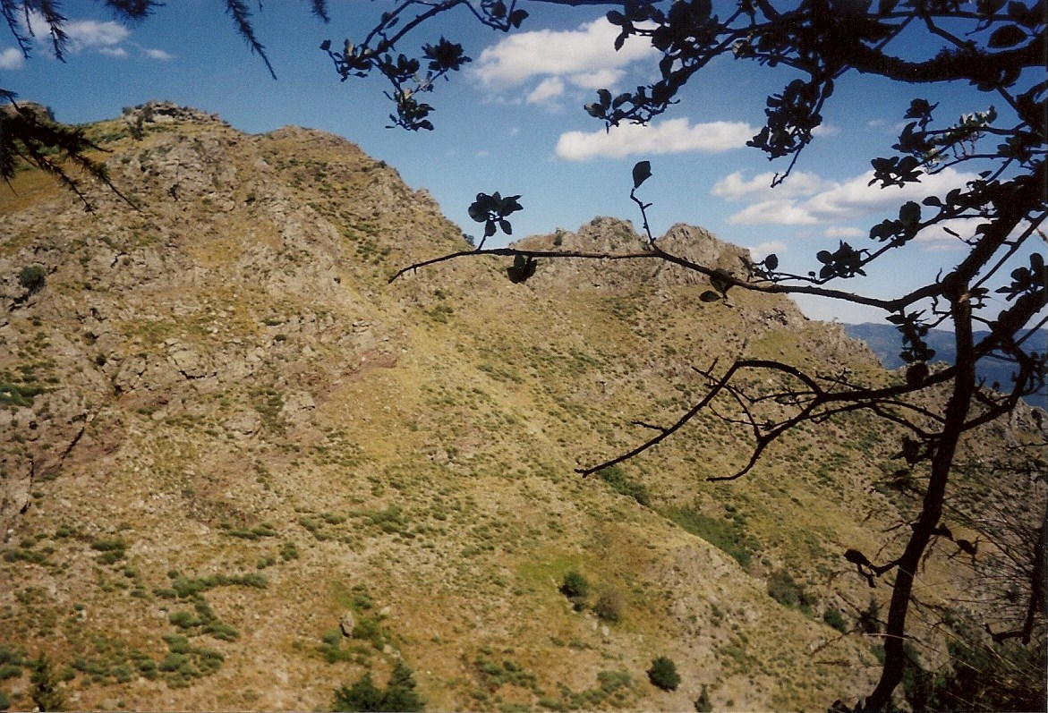 Rochers à côté du sentier des 4000 marches